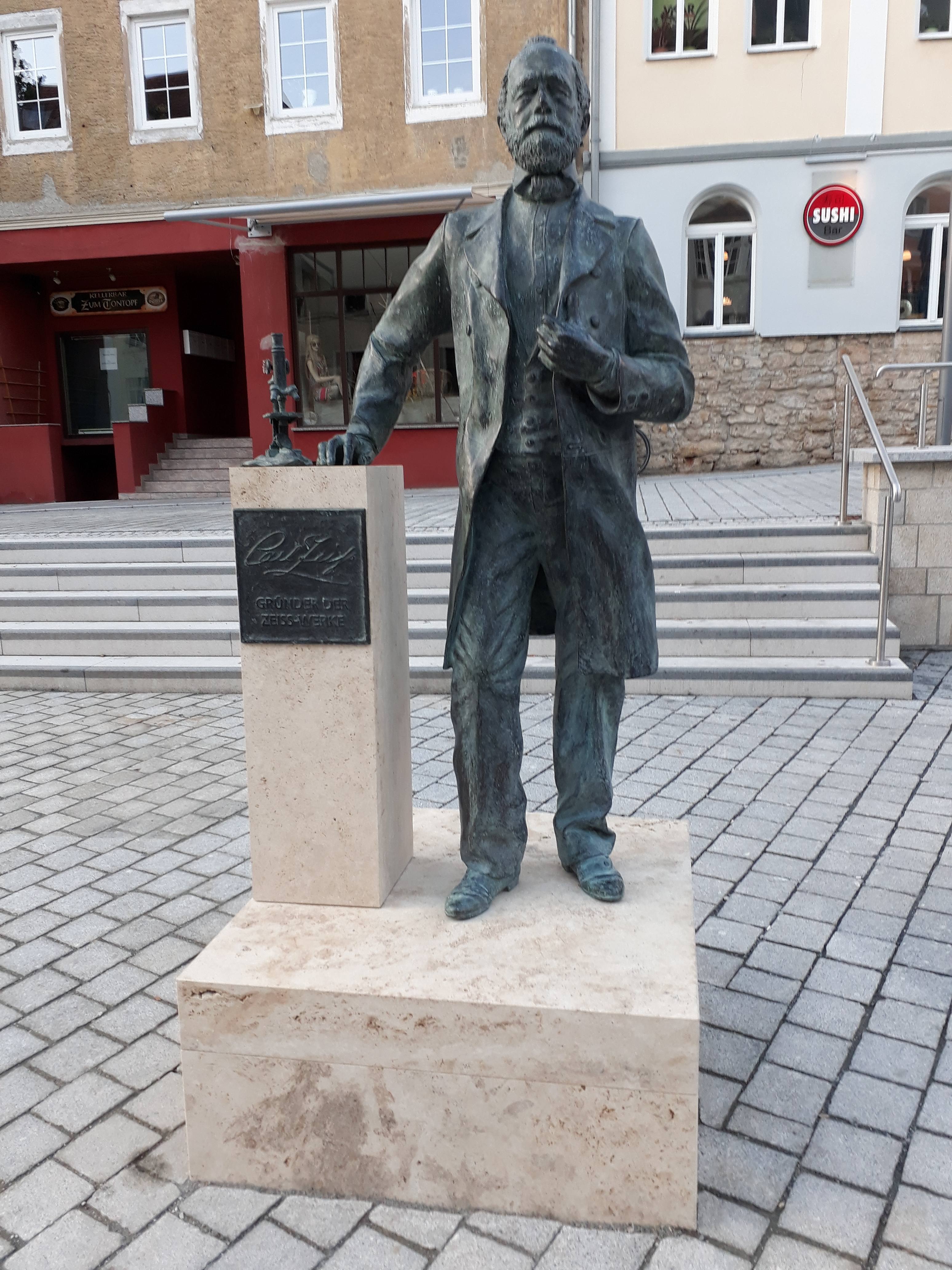 Denkmal für Carl Zeiss auf dem Johannisplatz in Jena, Thüringen